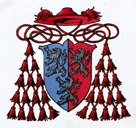 Hugo Gerhard Ströhl: "Heraldischer Atlas". Stuttgart 1899. Tafel 49, Kirchliche Heraldik, Bild 3, Wappen Kardinal Herbert Vaughan